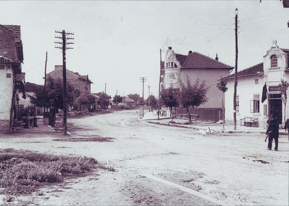 Изглед от с. Исперих, Разградско.